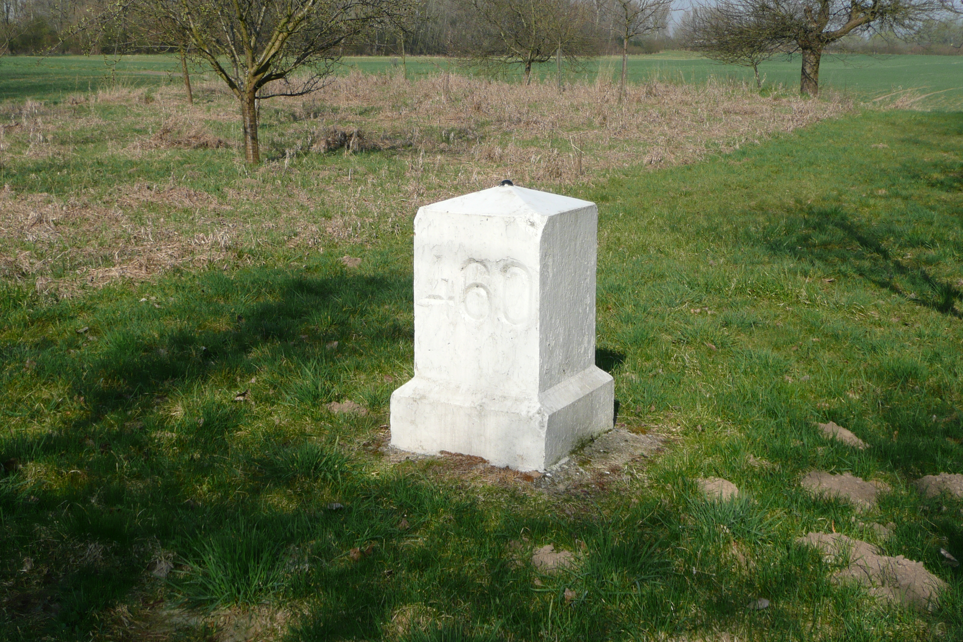 Worms-Ibersheim, Wörth, Kilometer-Stein, 460 km von Konstanz